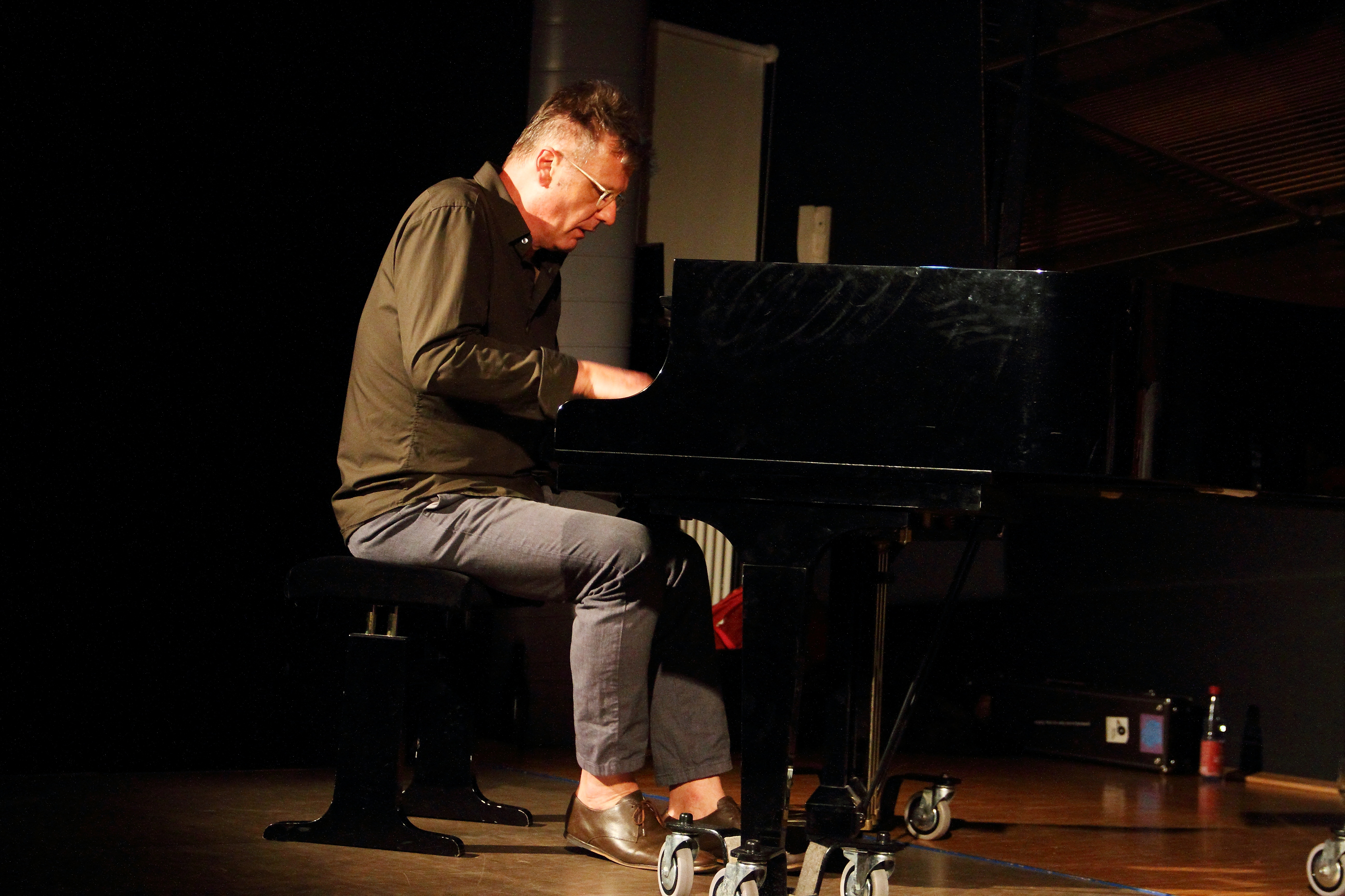 Konzert mit ROPE im KULT in Niederstetten. Eine Zusammenarbeit des Club W71 mit dem Kulturamt Niederstetten, ROPE sind: Uwe Oberg (Klavier) - Frank Paul Schubert (Sopransaxophon) - Paul Rogers (7-saitiger Bass) & Mark Sanders (Schlagzeug).